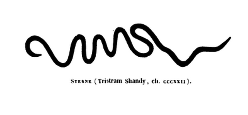 Balzac, La Peau de chagrin. Gallica